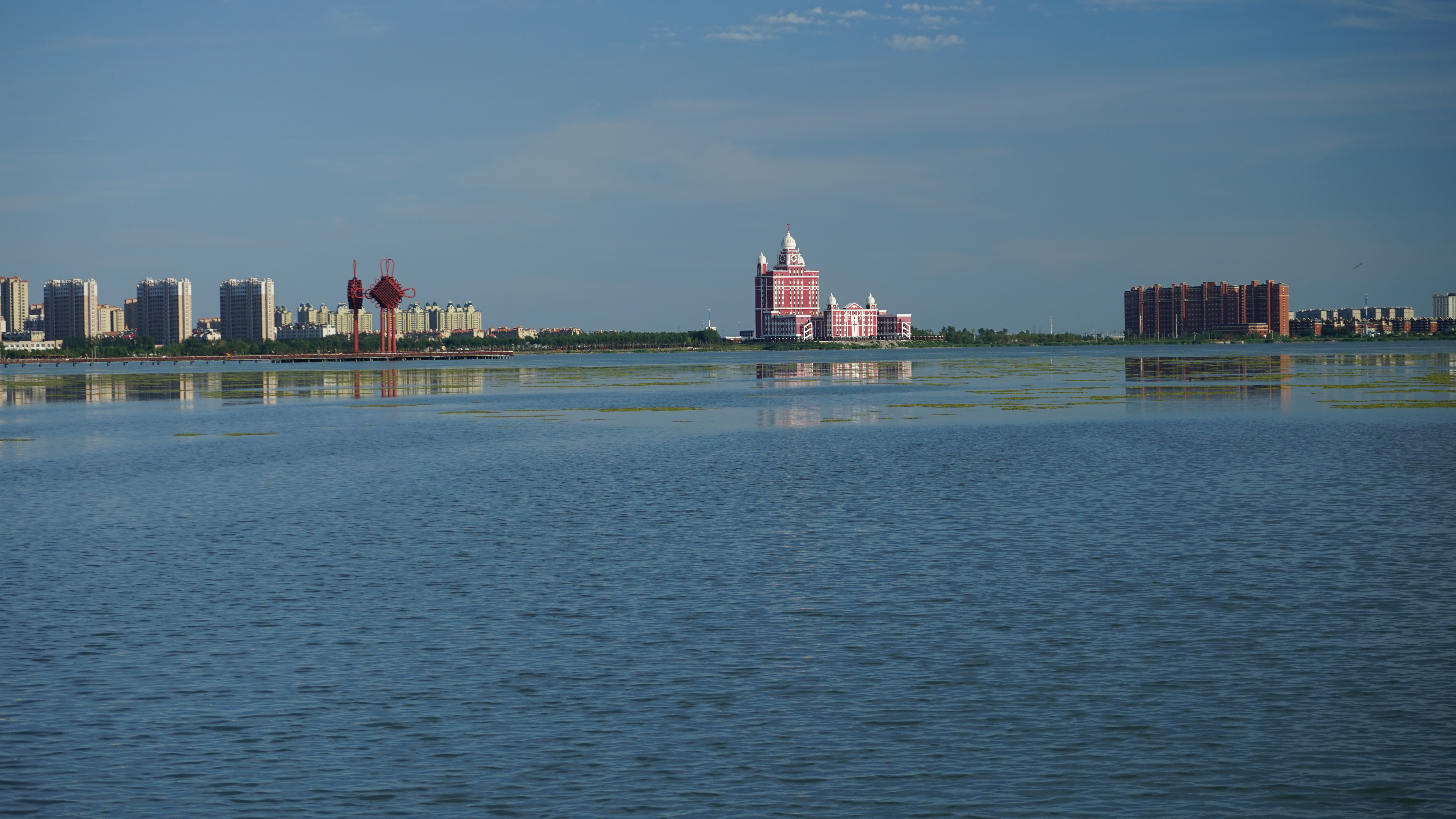 龙凤区三永湖。从北岸拍摄